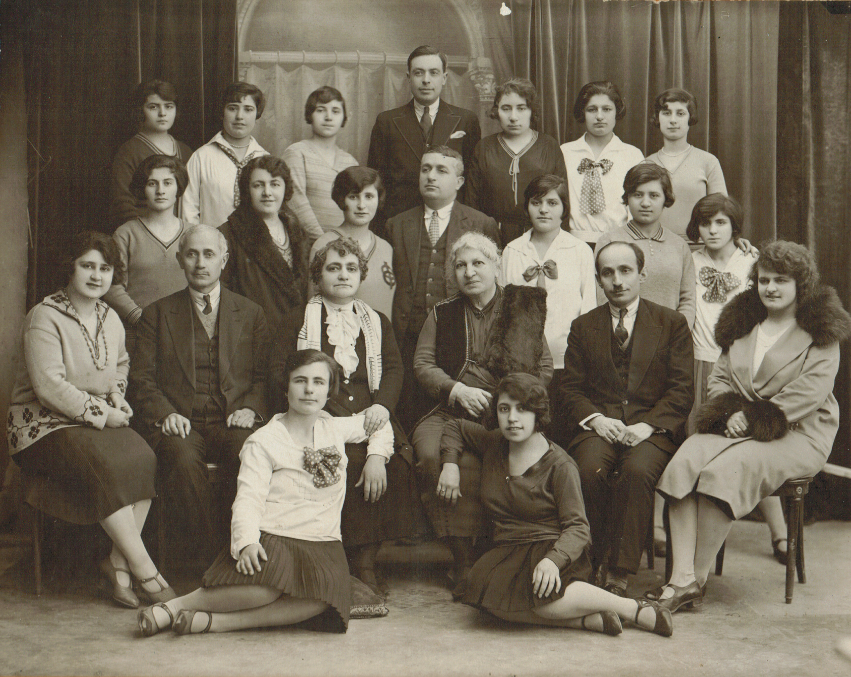 Équipe de l'école Tebrotzassère en 1928-1929.